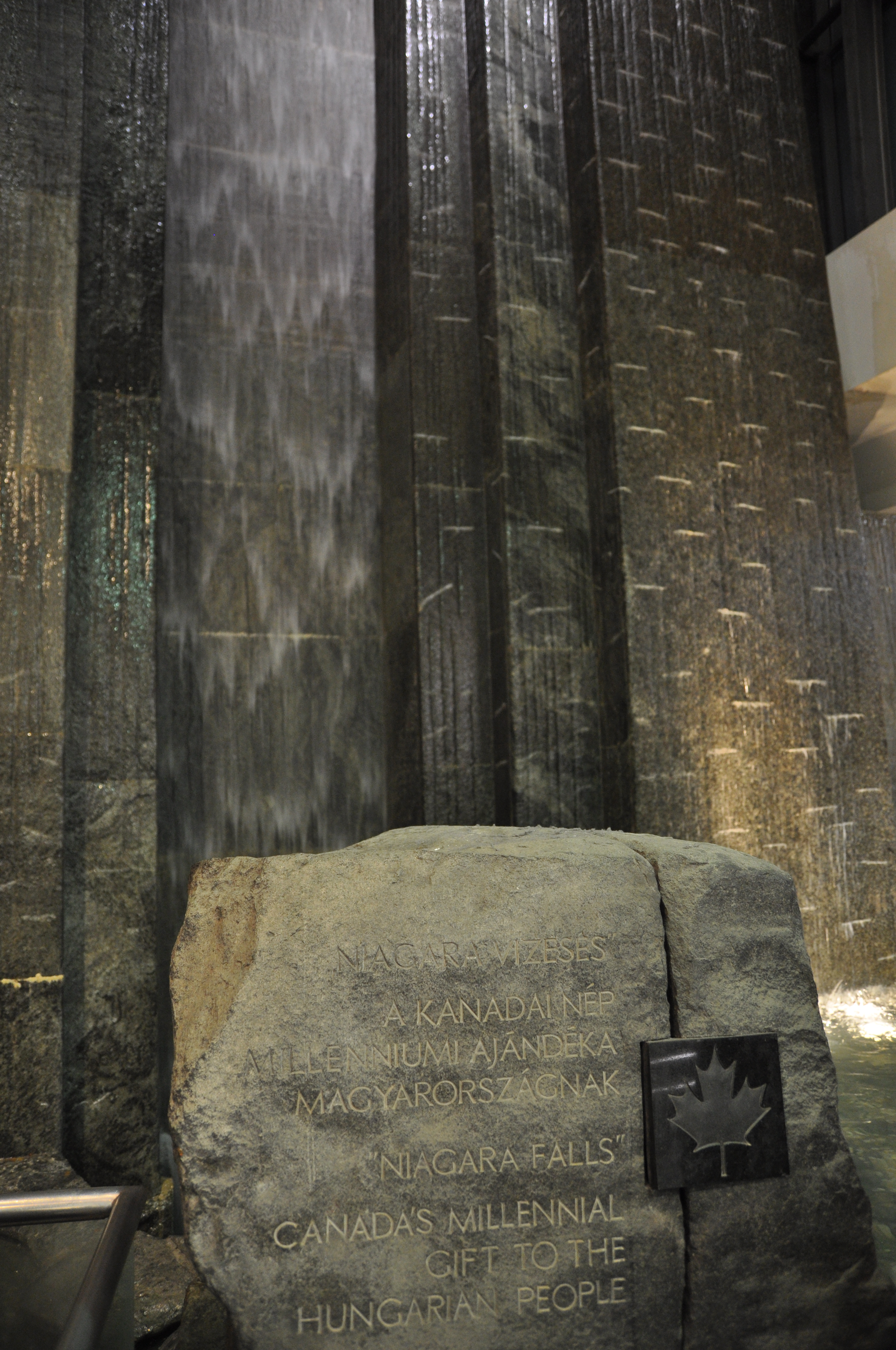 Budapest WestEnd City Center, Niagara vízesés